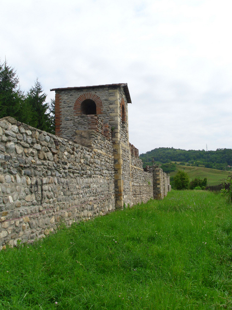 Castrul Roman Jidova 02